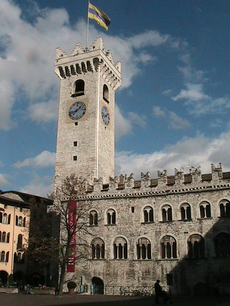 Trento - Palazzo Pretorio